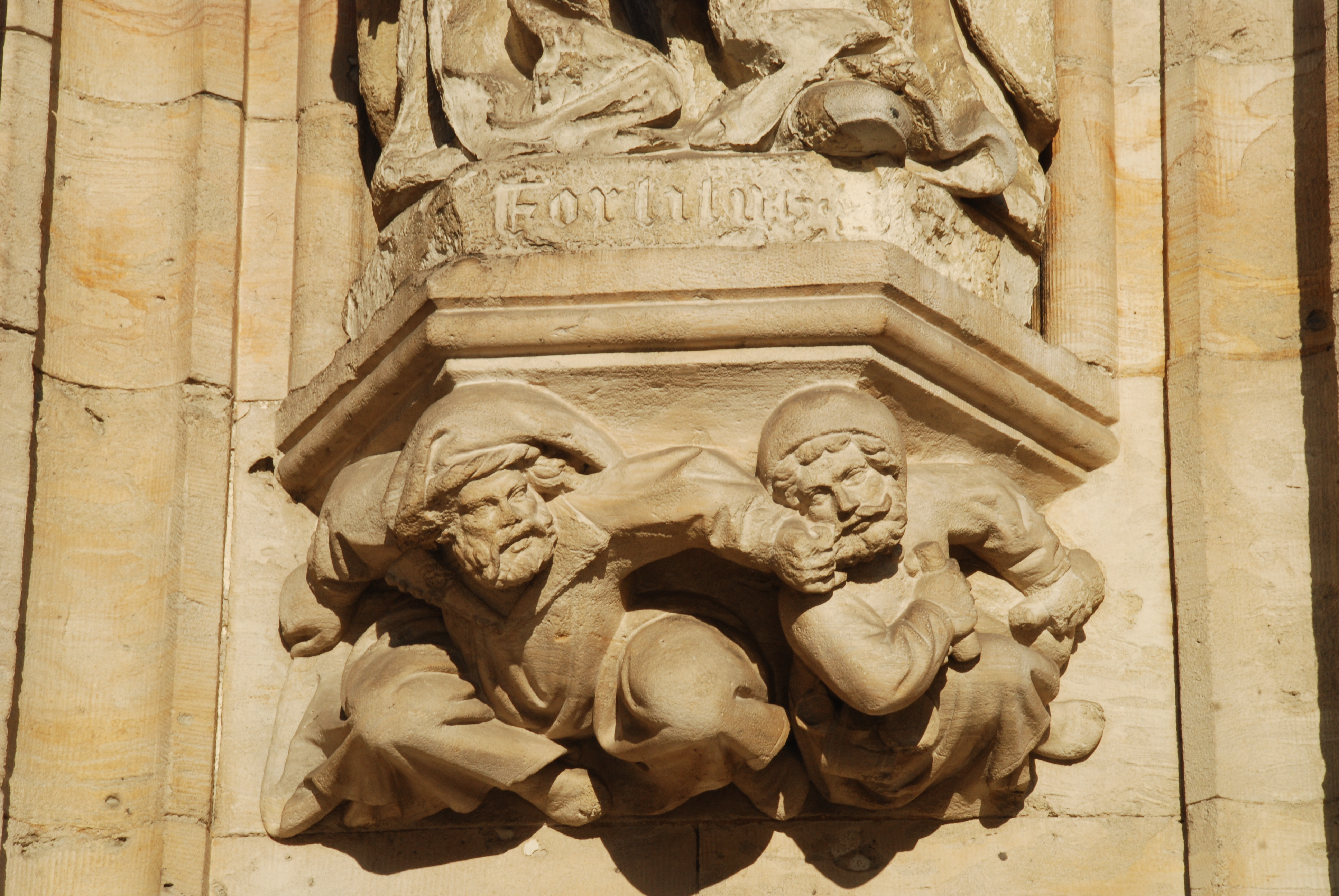 Belgique - Bruxelles - Grand-Place - Hôtel de ville